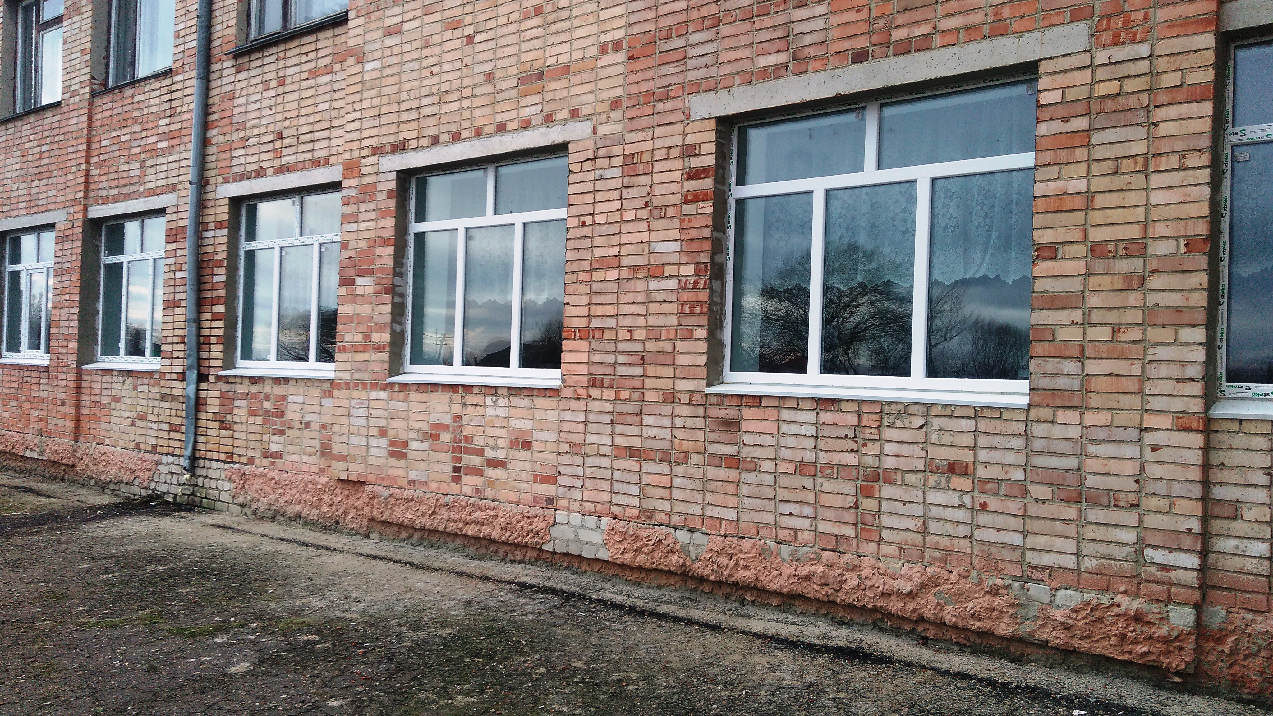 11 Нещеретовський сільський будинок культури after 3